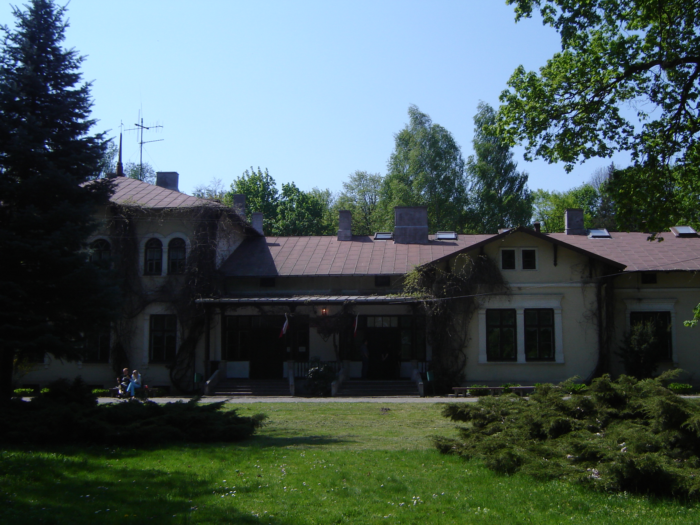 Liceum w Milanowie w gm. Milanów, pow. parczewskim, woj. lubelskim 06.1985.